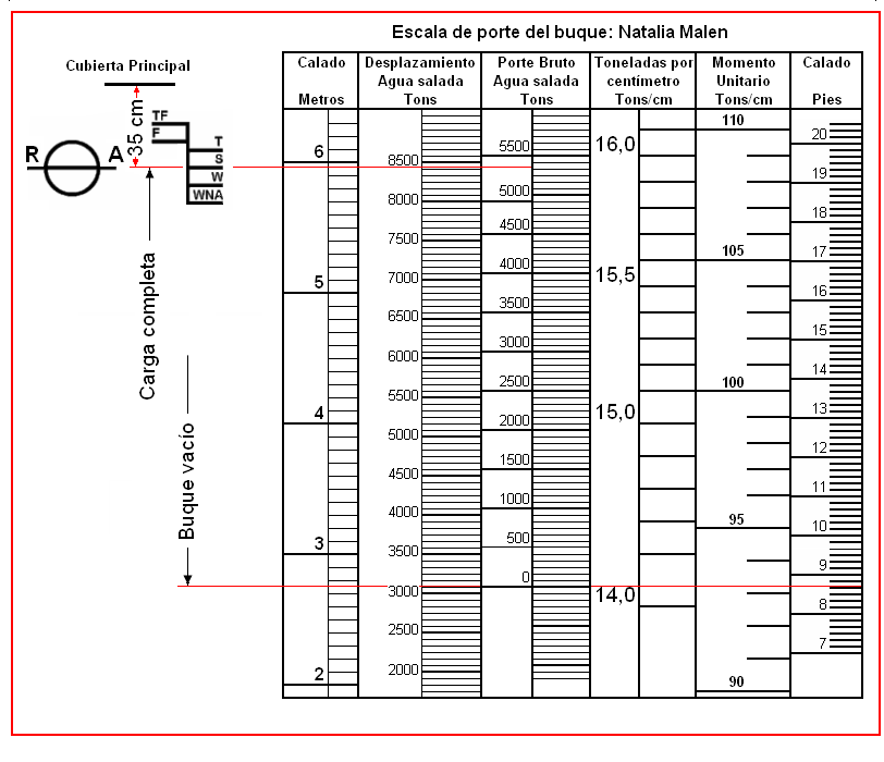 Escala de porte de un buque inexistente. (spanish)